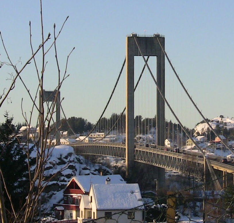 Sotra bridge